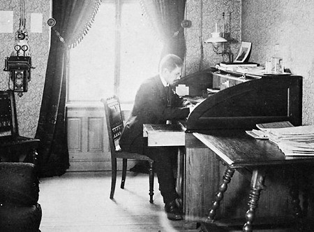 Elektroingenjör Ernst Danielson